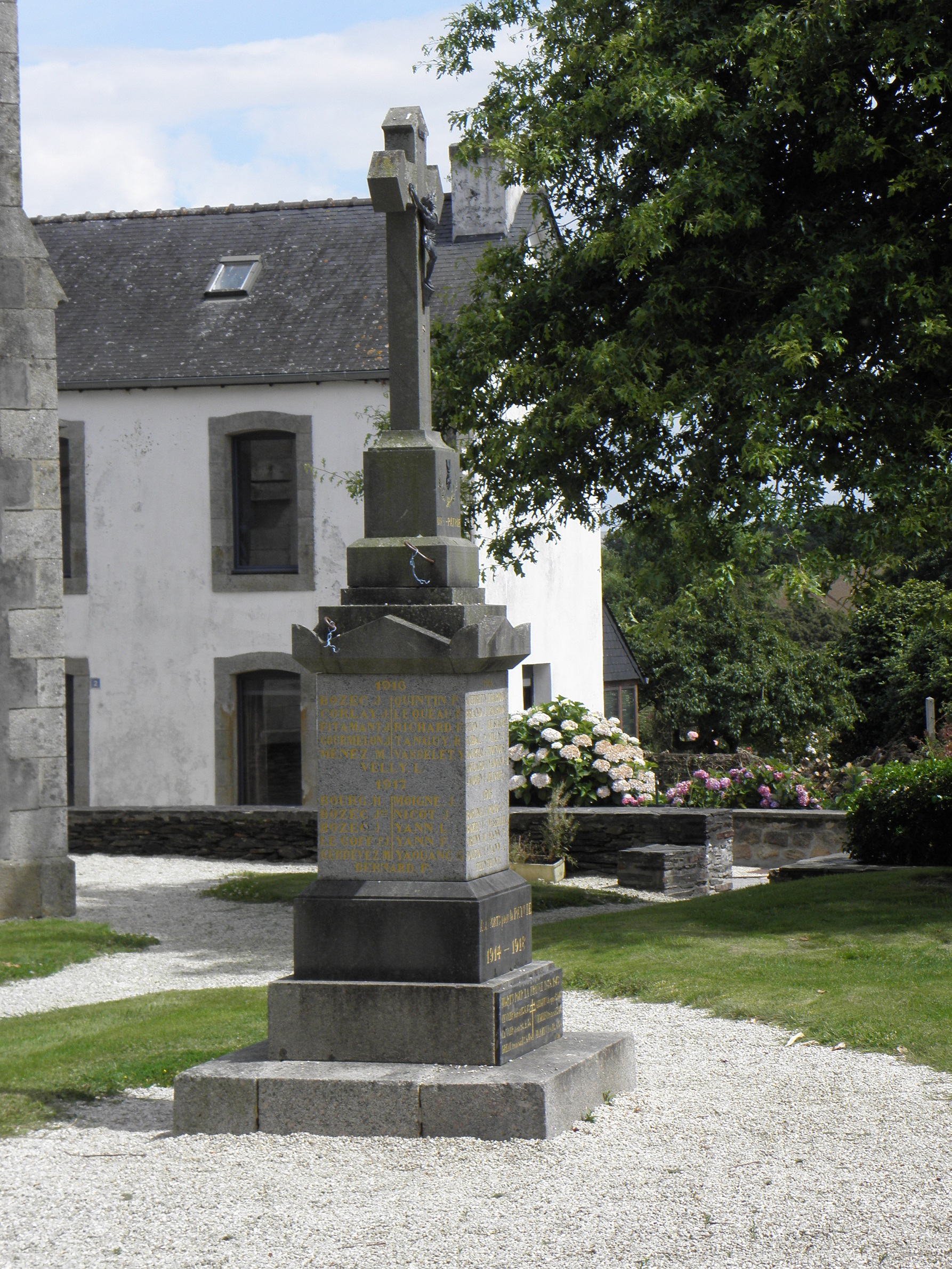 Monument aux morts de Lothey (29).